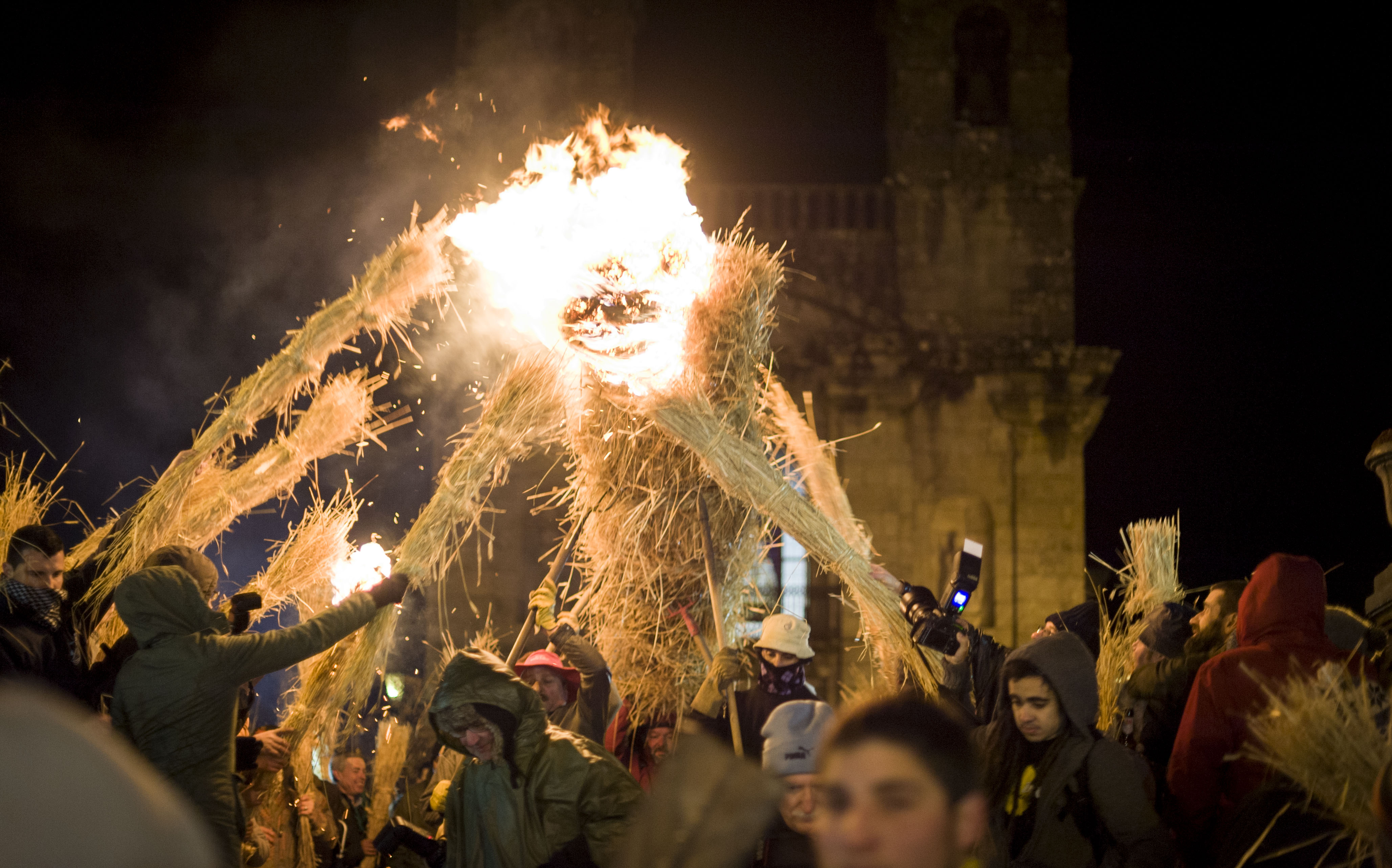 Festa dos Fachós en Castro Caldelas no ano 2014.